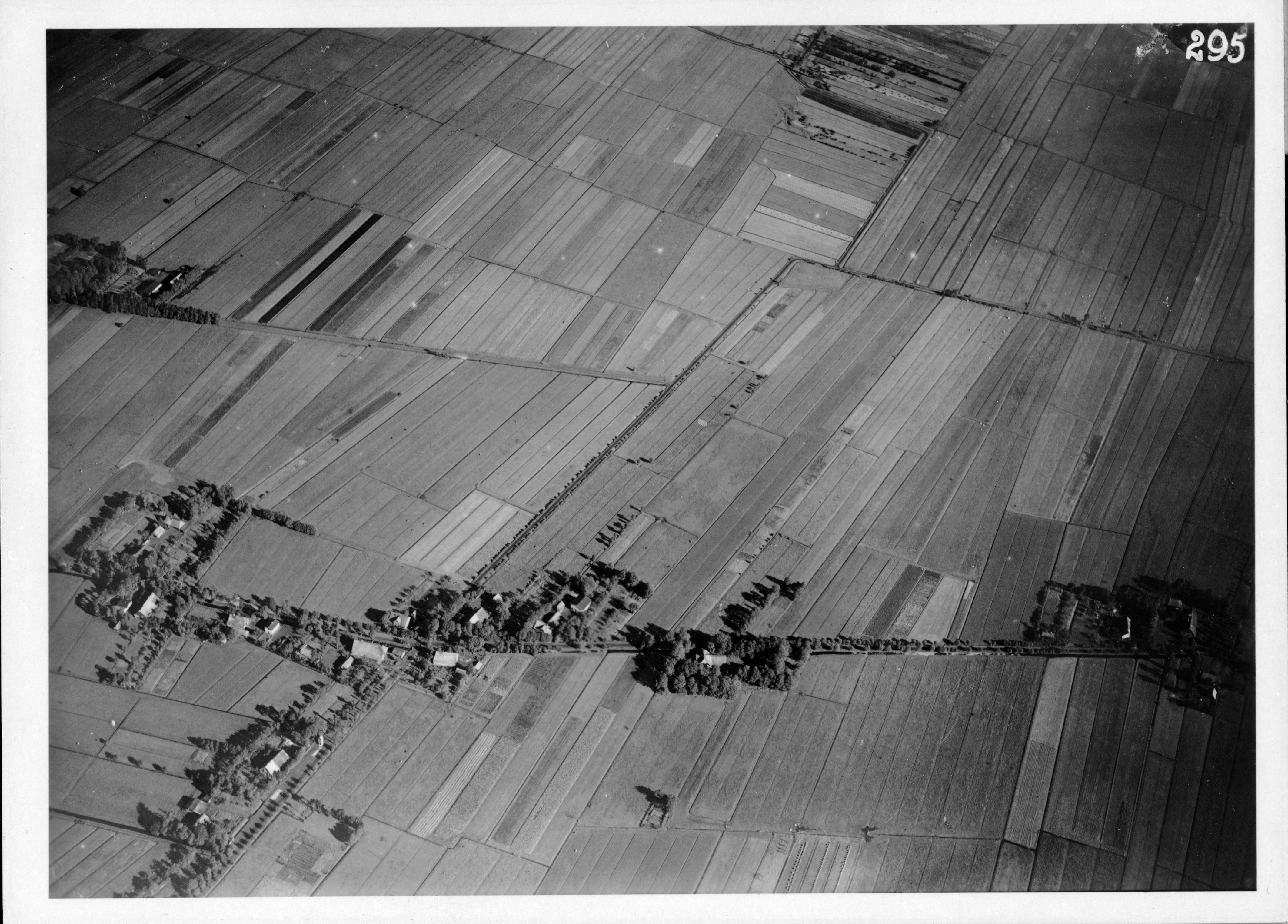 Schrägluftbild Richtung Vordergrund Großmoordamm mit Gebäuden. In der Bildmitte verläuft die Fünfhausener Straße (BildNr. 1921_22R18_295_N)